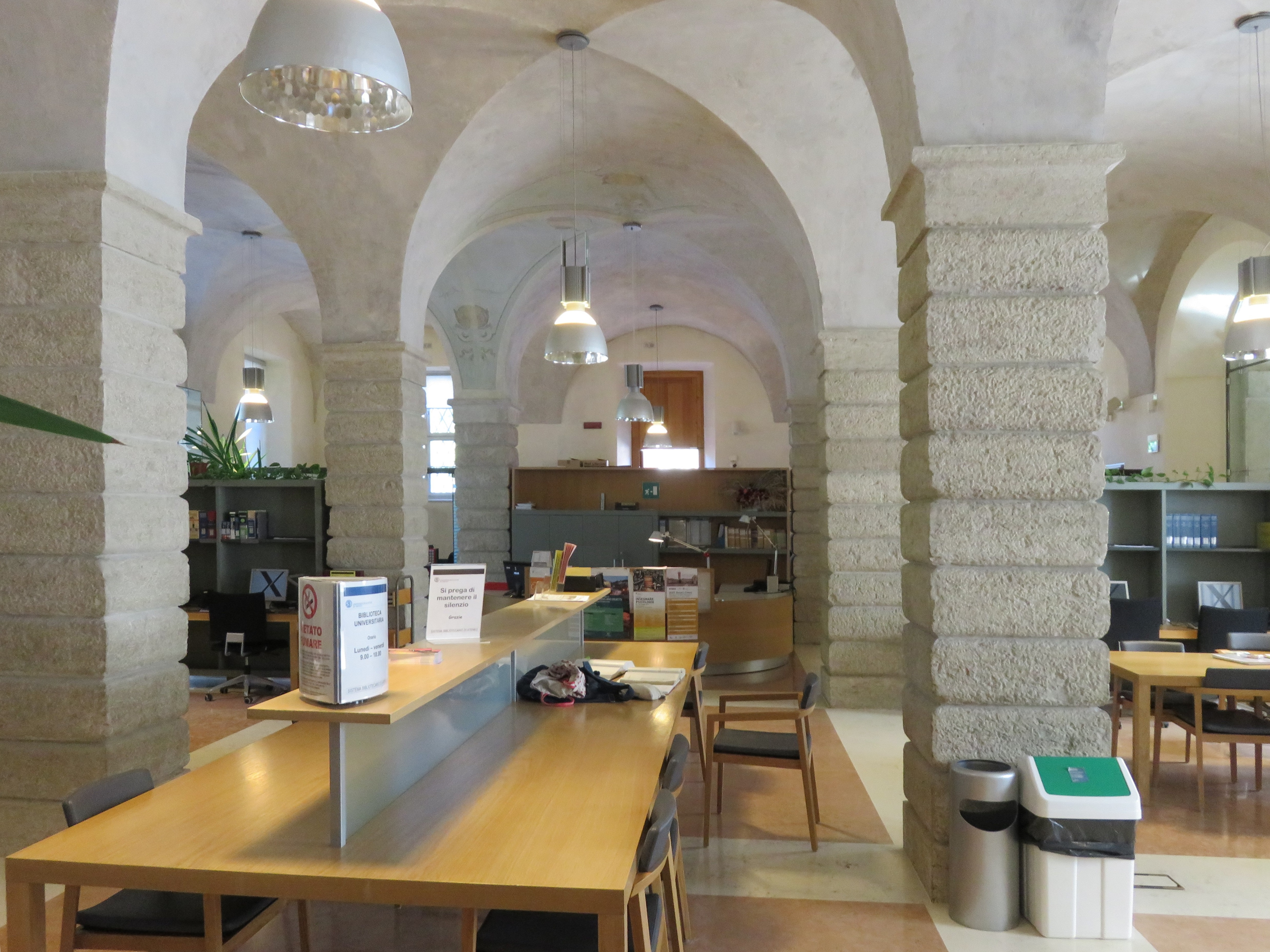 Biblioteca universitaria al piano terreno di Palazzo Annona. Biblioteca civica G. Tartarotti, Rovereto